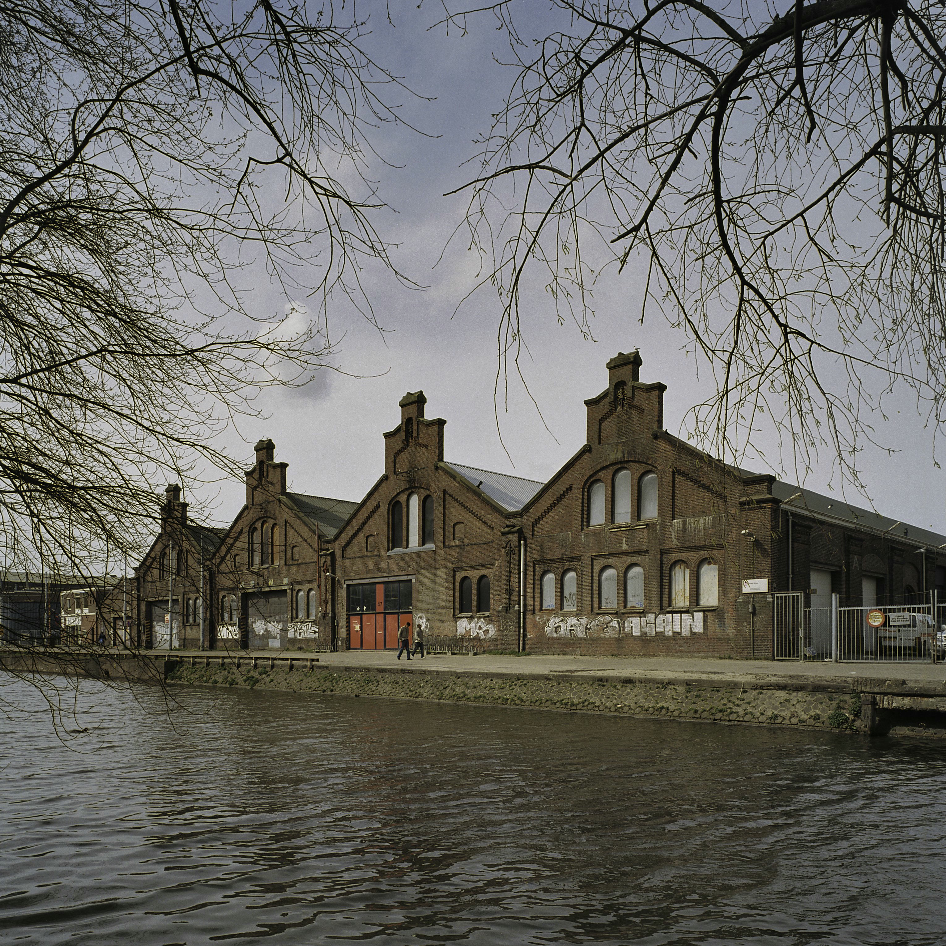 Oostergasfabriek, voormalig: Overzicht zuiveringshuis, behorende bij de Oostergasfabriek, gezien vanaf het water (opmerking: Gefotografeerd voor Monumenten In Nederland Noord-Holland)